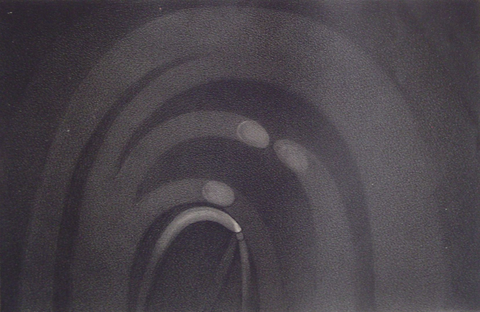 Wielka Kometa z 1861 roku - rysunek przedstawia obraz głowy komety z dnia 30-06-1861 roku. Autor to T. W. Webb, ilustracja pochodzi z książki Astronomie Karla von Littrowa z 1878 roku.